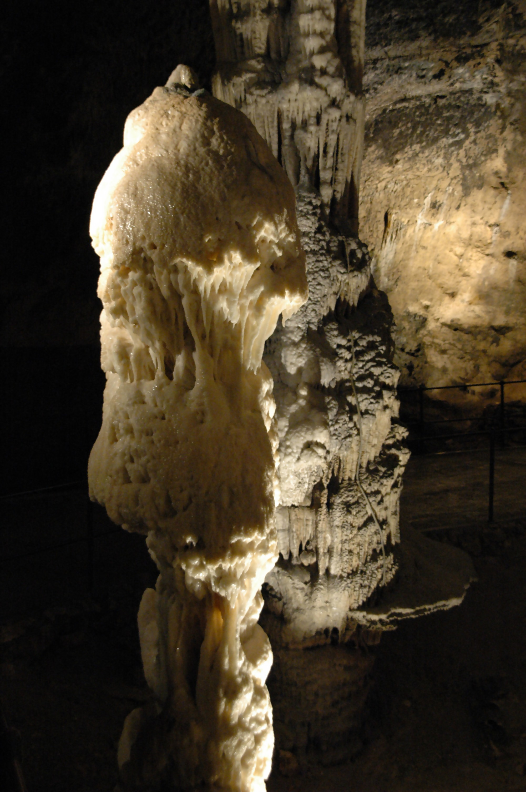 Concrétion calcaire dans la grotte de Postojna (Slovénie). Le calcaire qui la compose, d'une parfaite blancheur, serait pur. Photographie : GUERRAZ François (c) 2006